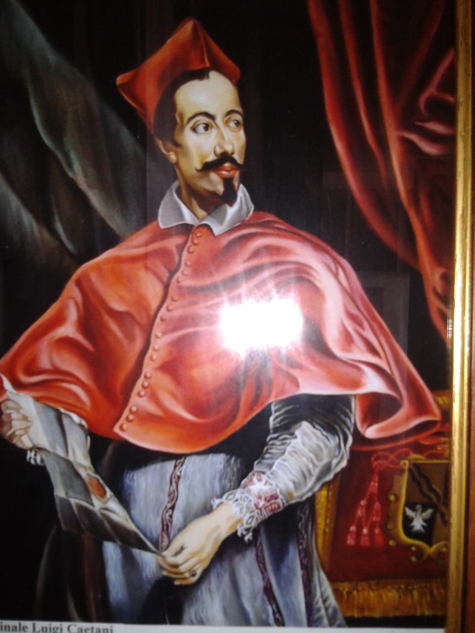 Foto Realizzata nell'Appartamento Nobile del Palazzo Episcopale dell'Arcidiocesi di Capua